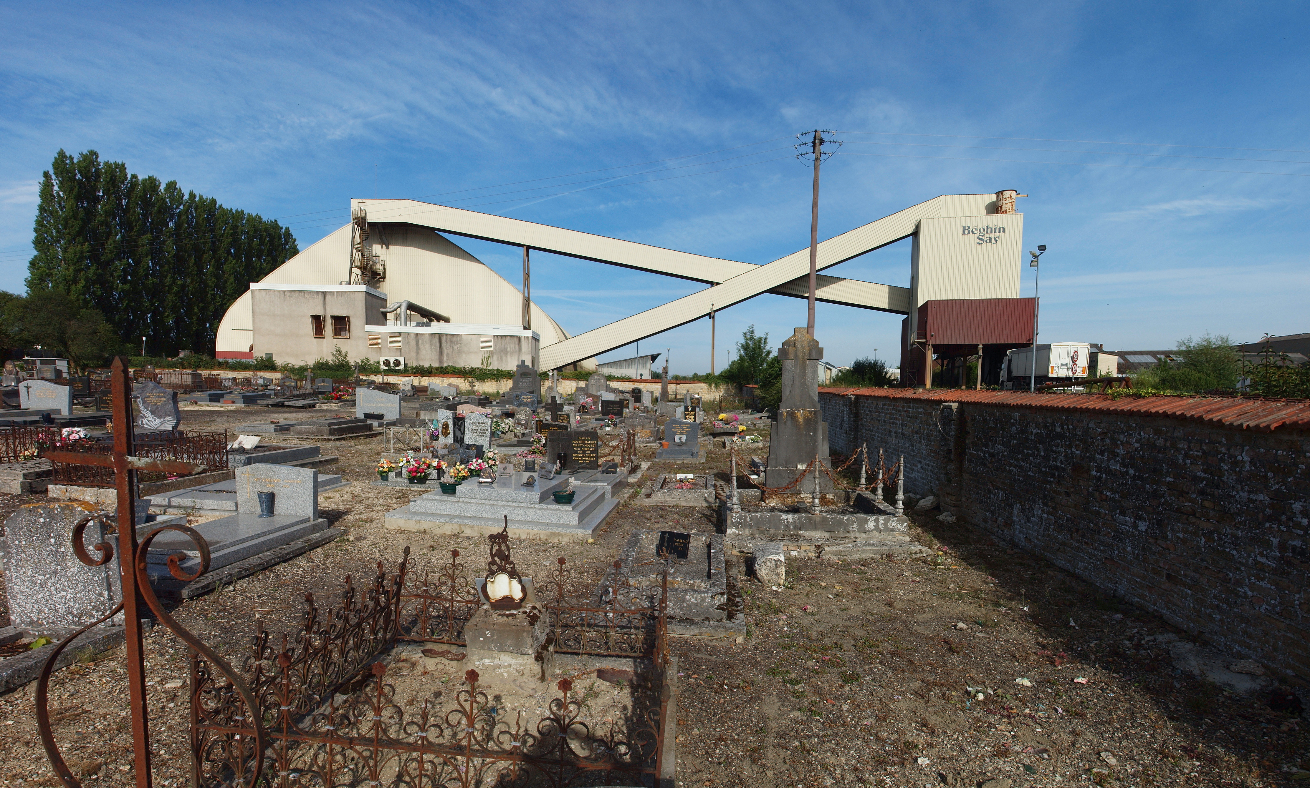 Cimetière d'Attigny (Ardennes, France) & l'ancienne usine Beghin-Say